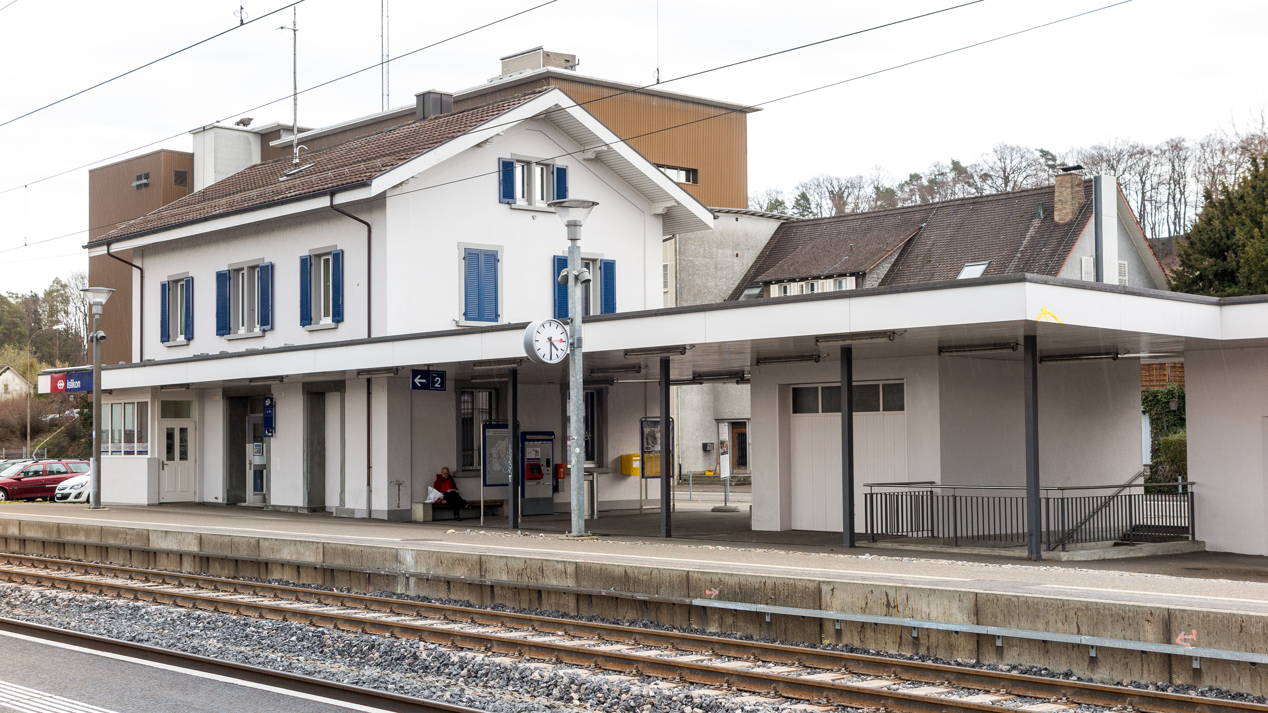 Bahnhof Islikon (2018)